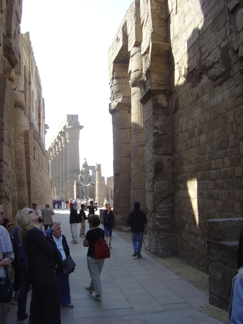 Tempel van Luxor eigen foto januari 2007 Luxor Ben Pirard